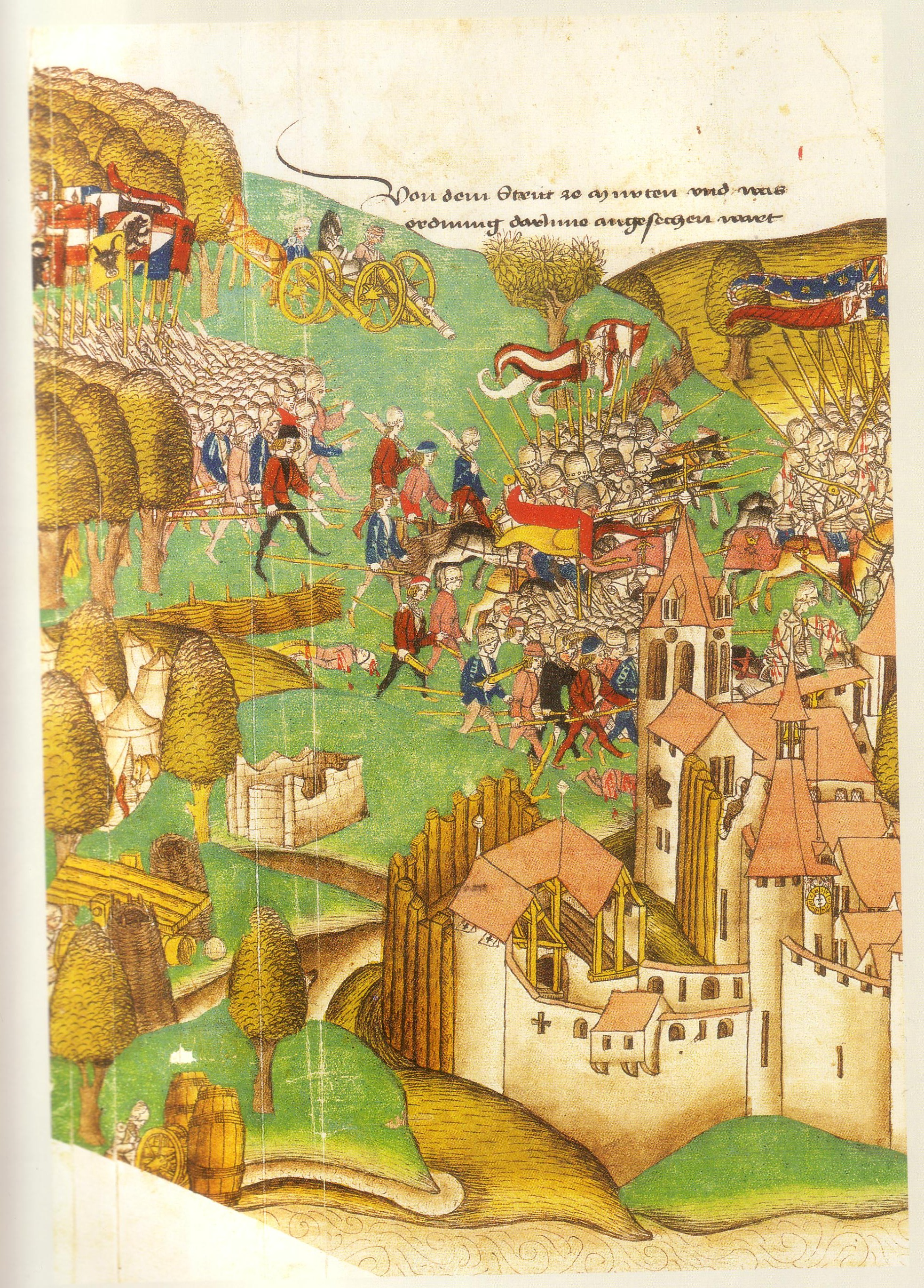 Murten-Schlacht 1476, Zürcher Schilling, ZB Zürich, Ms. A 5, S. 654